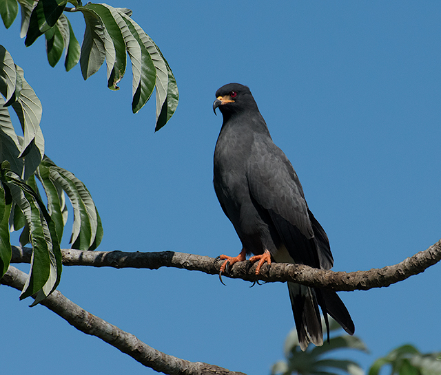 Restaurante Maçarico - Bataguassu-MS - Brasil